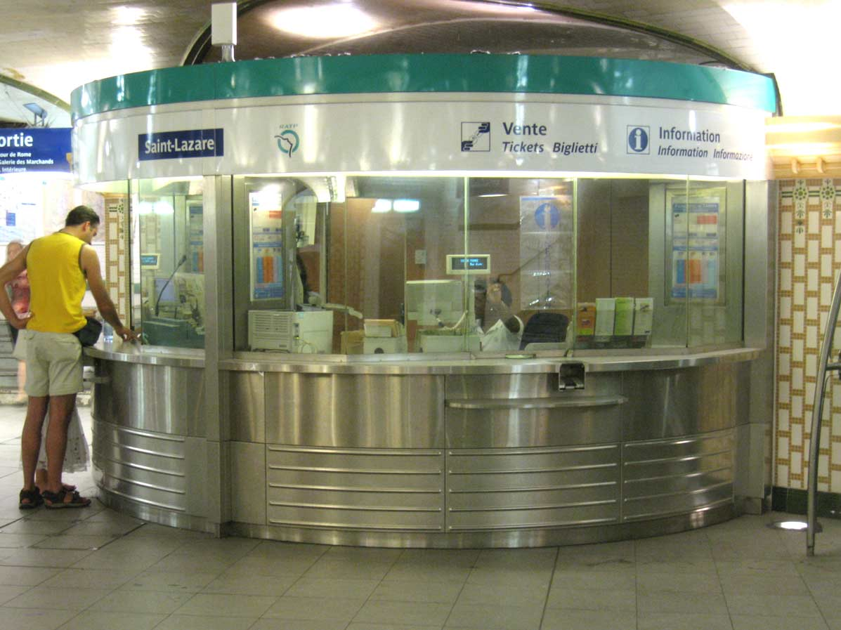 Metro de Paris Guichet a la gare Saint Lazare Lieu : Paris, France Date : Juin 2006 Auteur : Pline photo personnelle